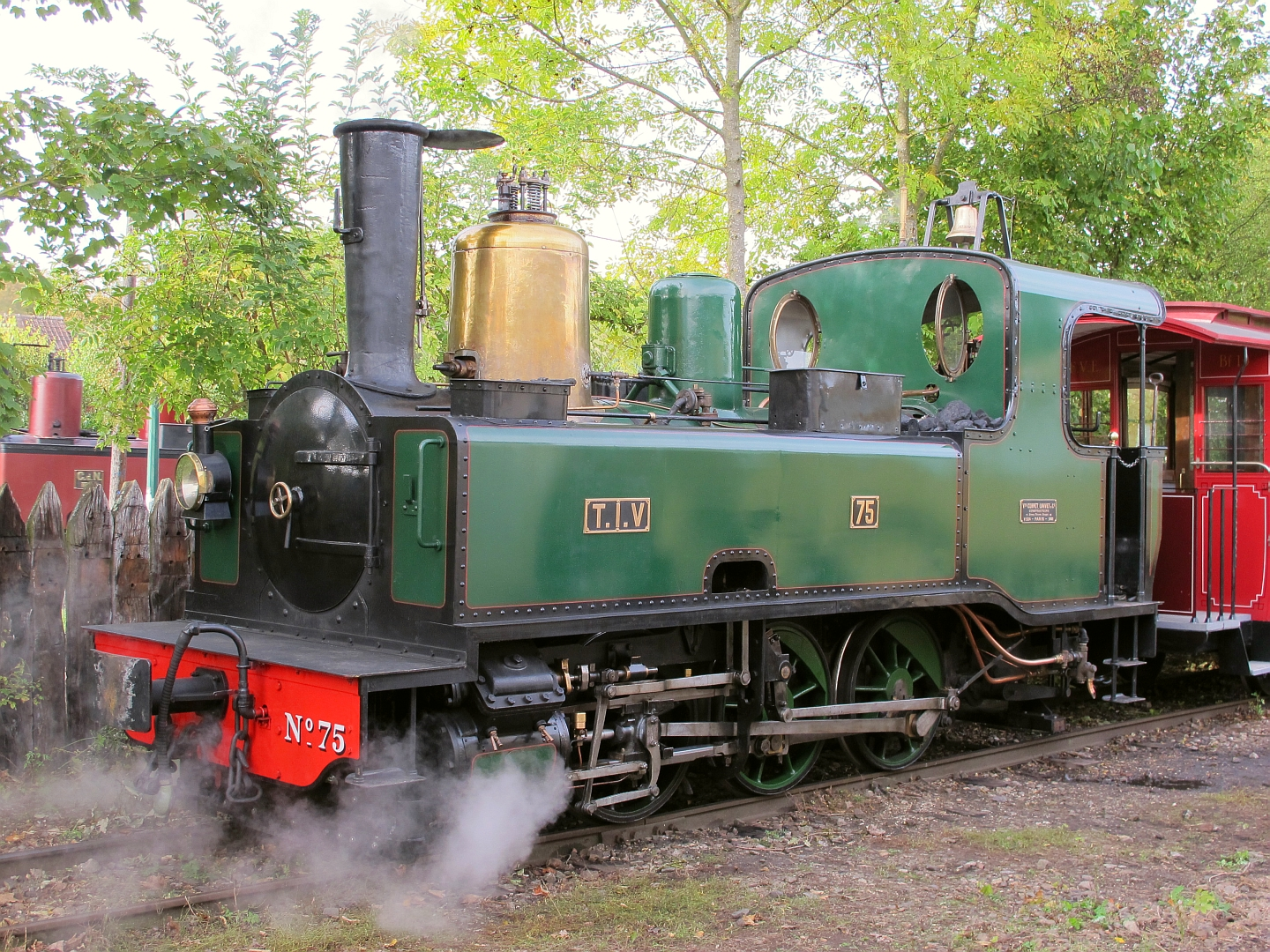 La 030 T N°75 Corpet-Louvet ex-Tramways d'Ille-et-Vilaine, du Musée des tramways à vapeur et des chemins de fer secondaires français, à Butry-sur-Oise le 7 octobre 2012.